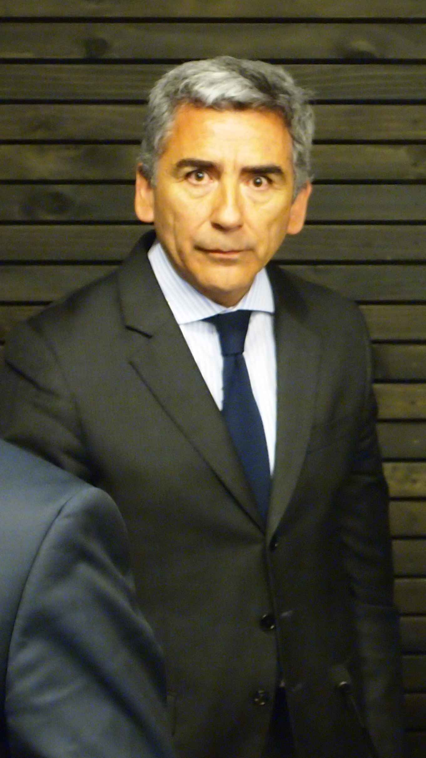 Carlos Peña, Rector de la Universidad Diego Portales, el 4 octubre del 2012 detras del hombro del Primer Ministro de Irlanda.